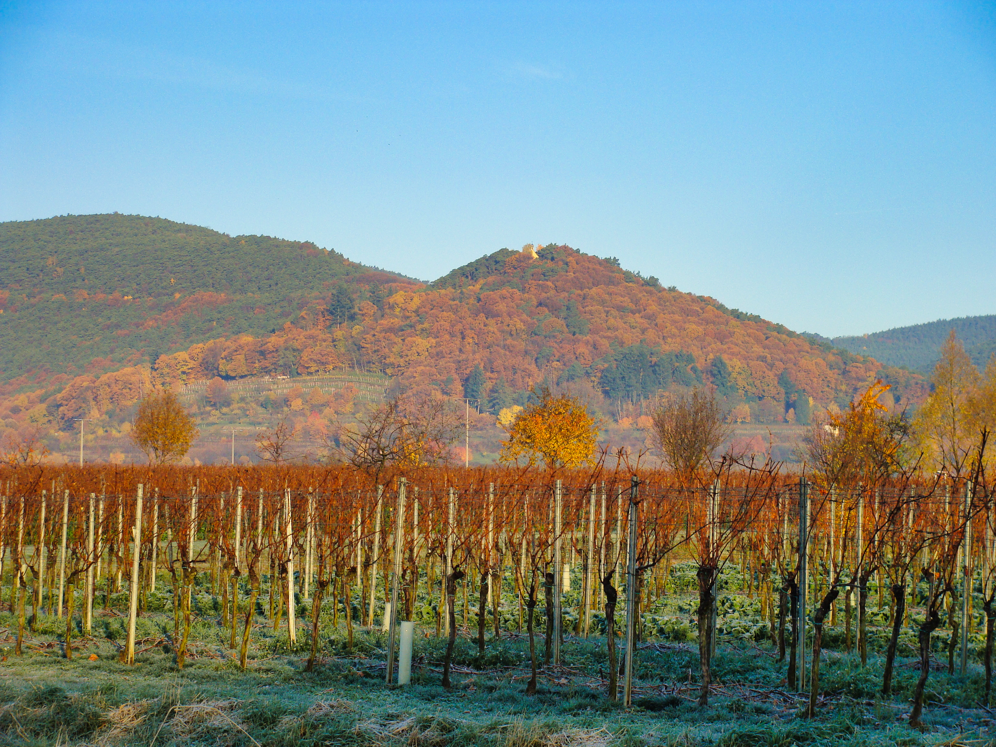 Wetterkreuzberg (Haardt) bei Maikammer im Pfälzerwald